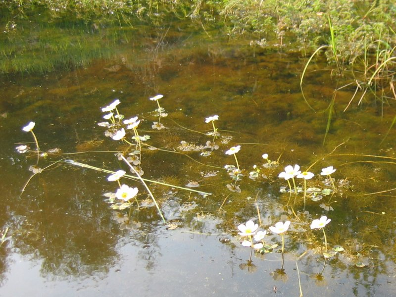 Der Wasser-Hahnenfuß Ranunculus aquatilis in einem Soll